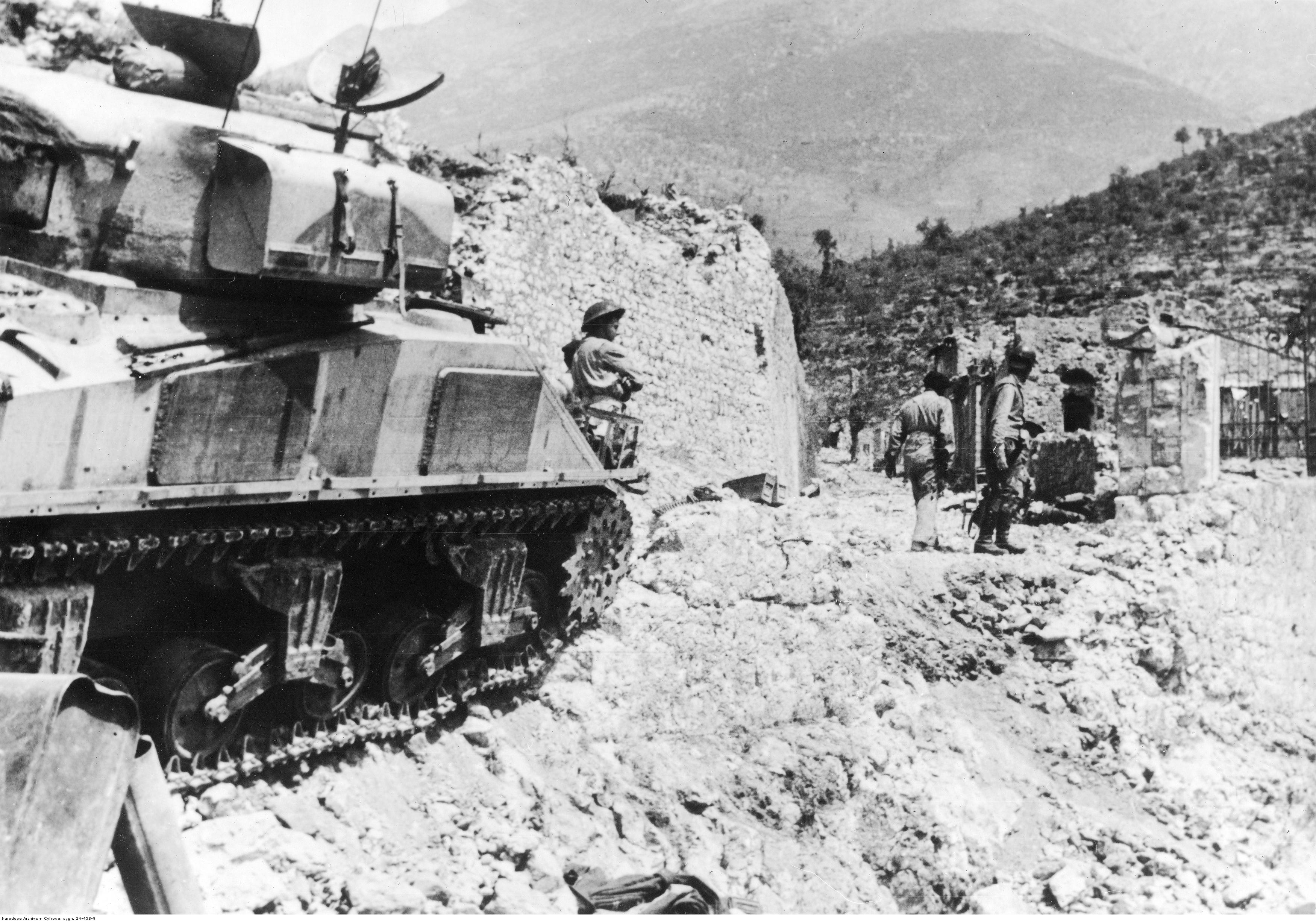 Żołnierze 2 Korpusu Polskiego w zdobytym Piedimonte na wzgórzu Maiola. Czołg M4 Sherman z 6 Pułku Pancernego "Dzieci Lwowskich" wśród ruin. Archiwum Fotograficzne Tadeusza Szumańskiego. Sygnatura: 24-458-9